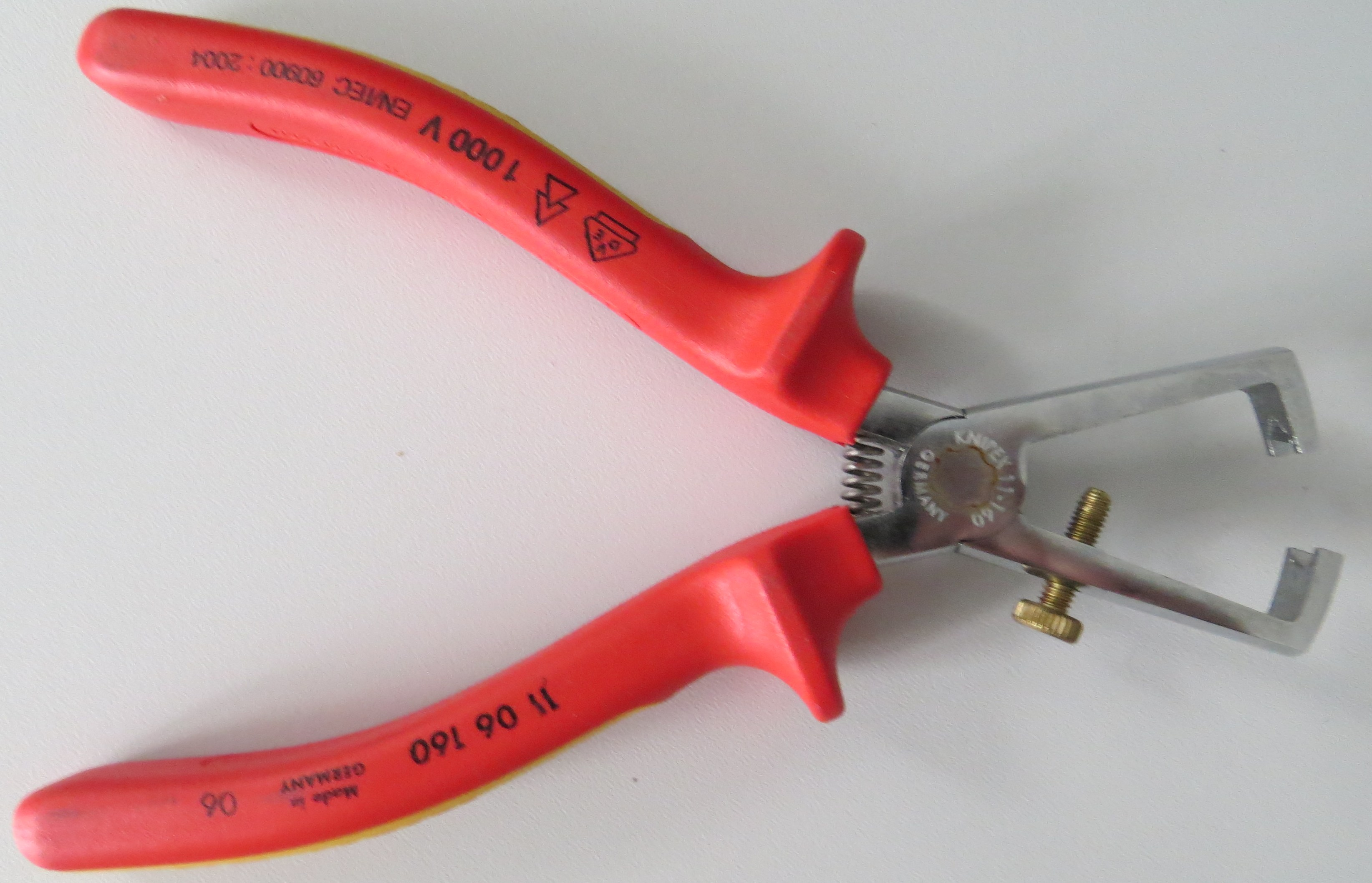 Abisolierzange